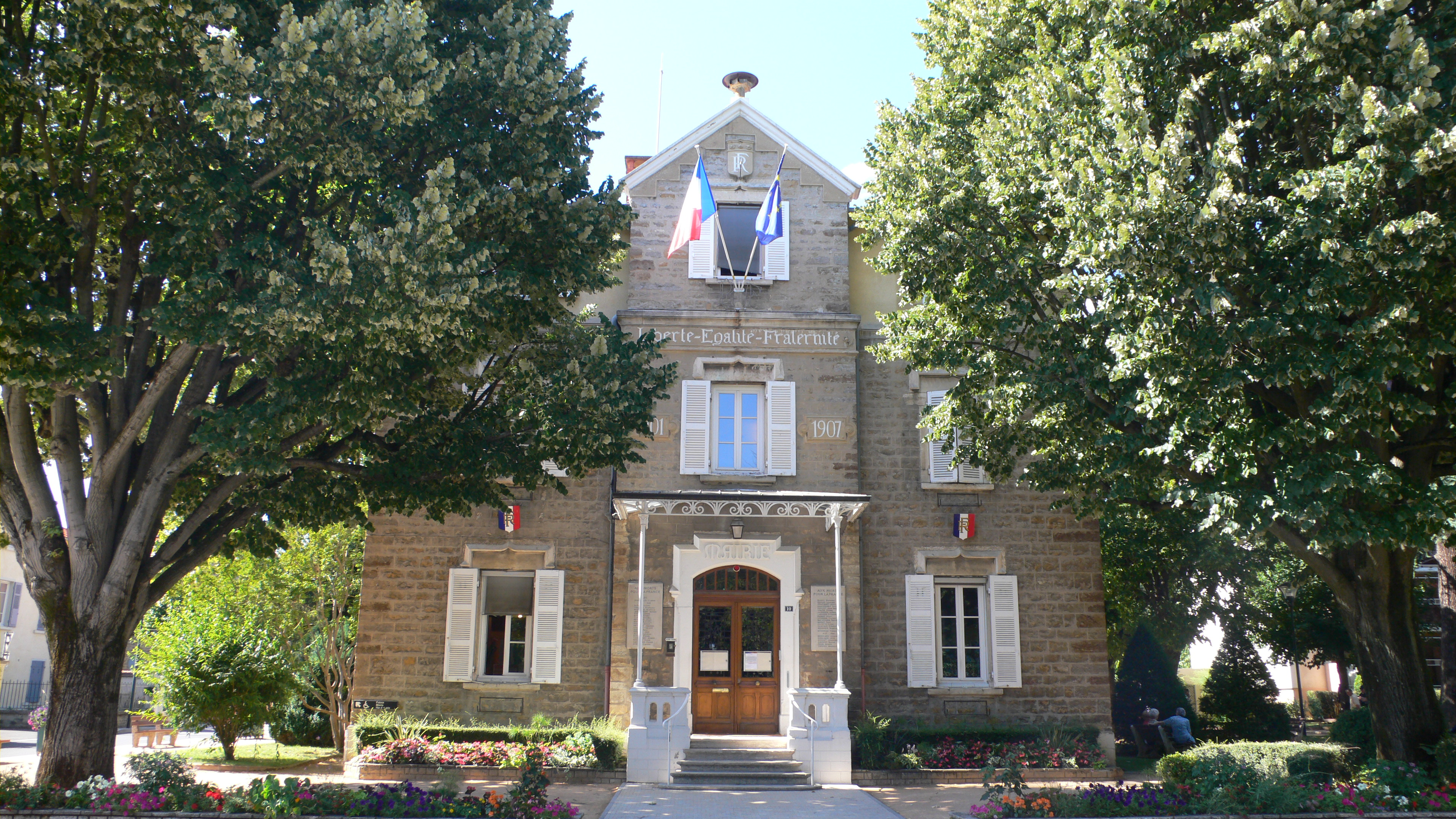 Champagne-au-Mont-d'Or - La mairie en juillet 2010